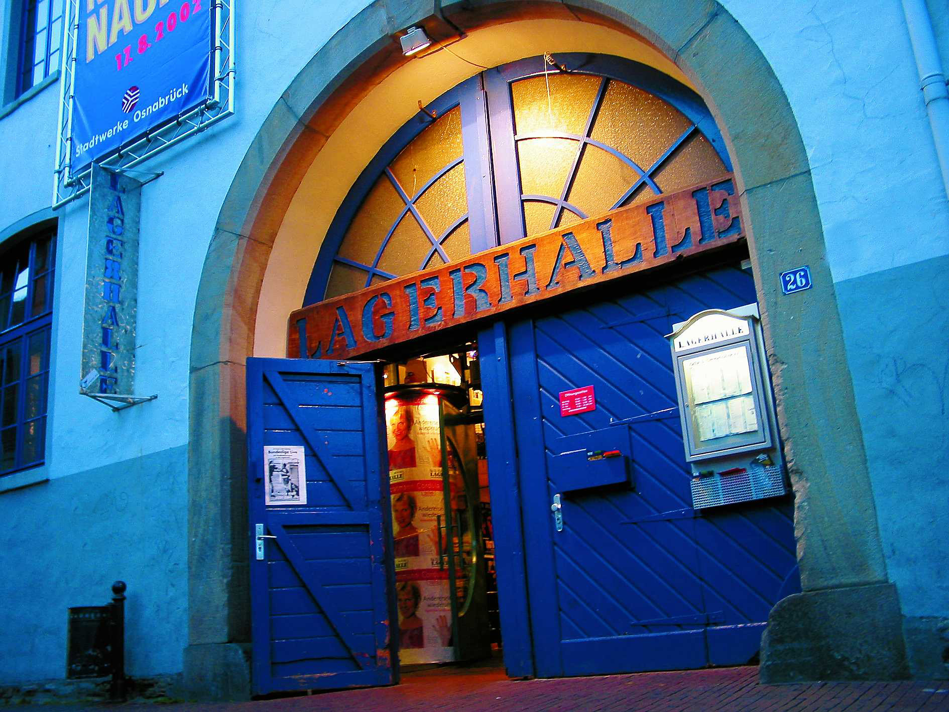 Es handelt sich hierbei um den Haupteingang des Kultur-und Kommunikationszentrum Lagerhalle e.V.